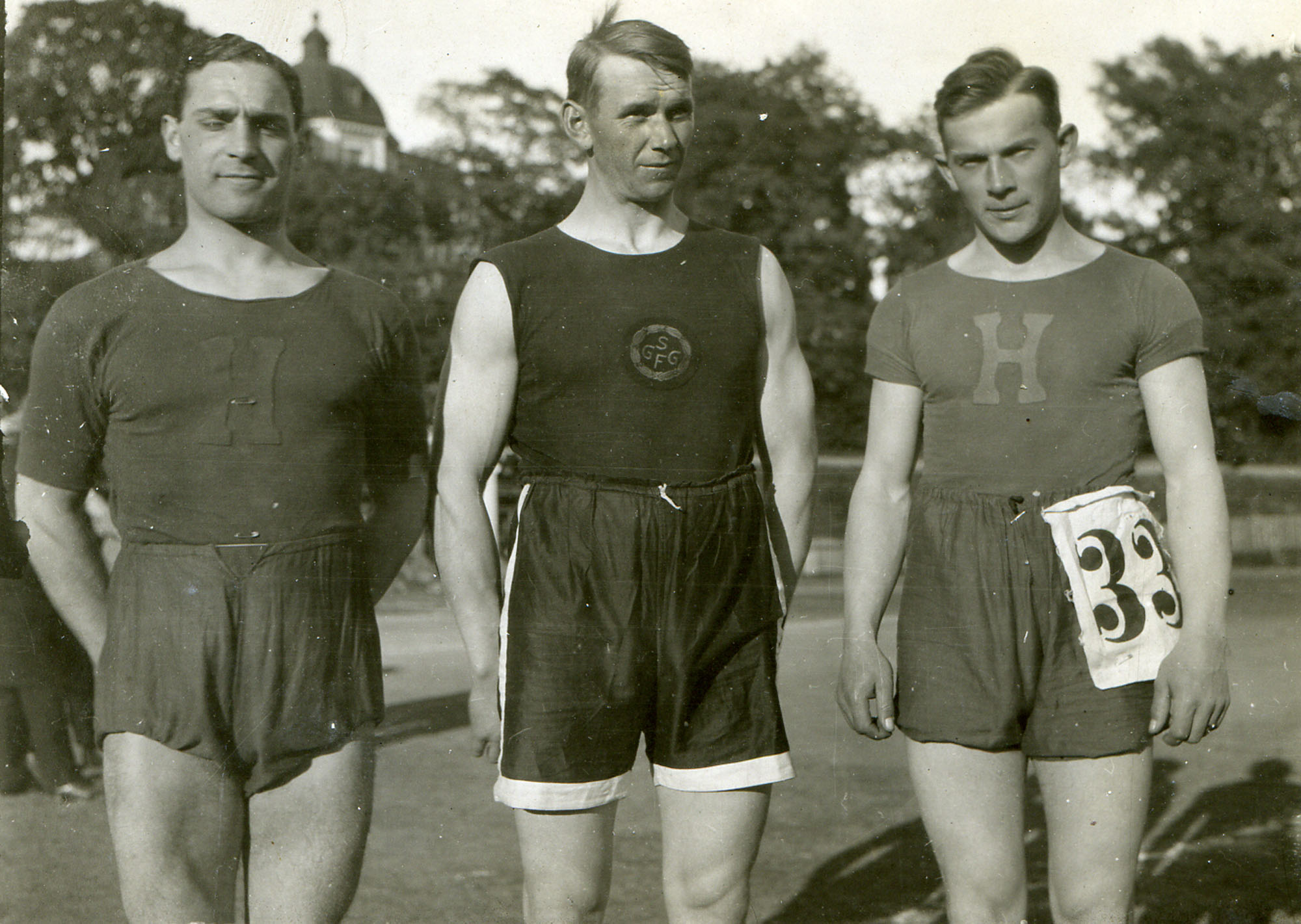 Fausto Acke, Axel Skeppstedt [1] och Erik Werner [2] slogs om kastsegrarna i Gävle 1919.